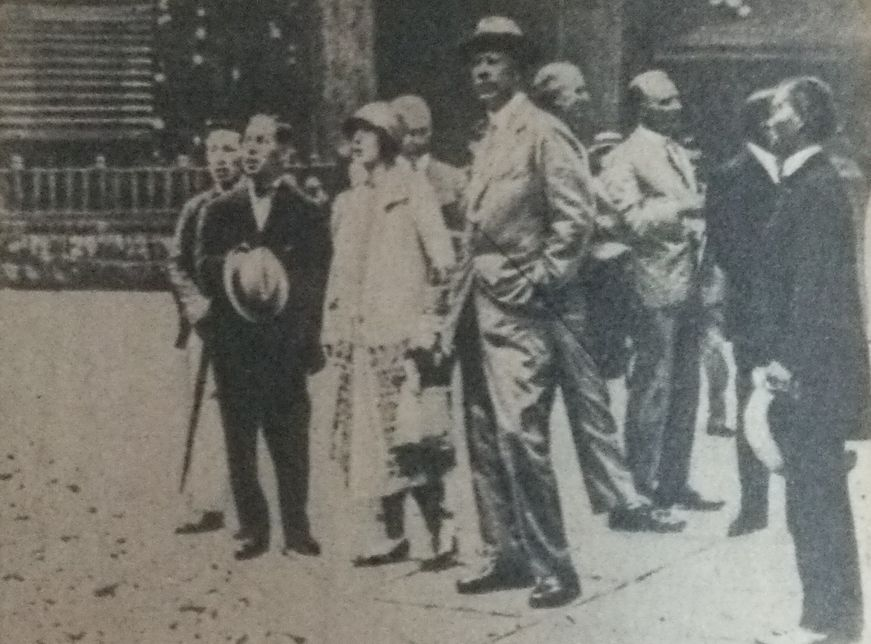 スウェーデン皇太子グスタフと妻ルイーズ（1926年の訪日時）